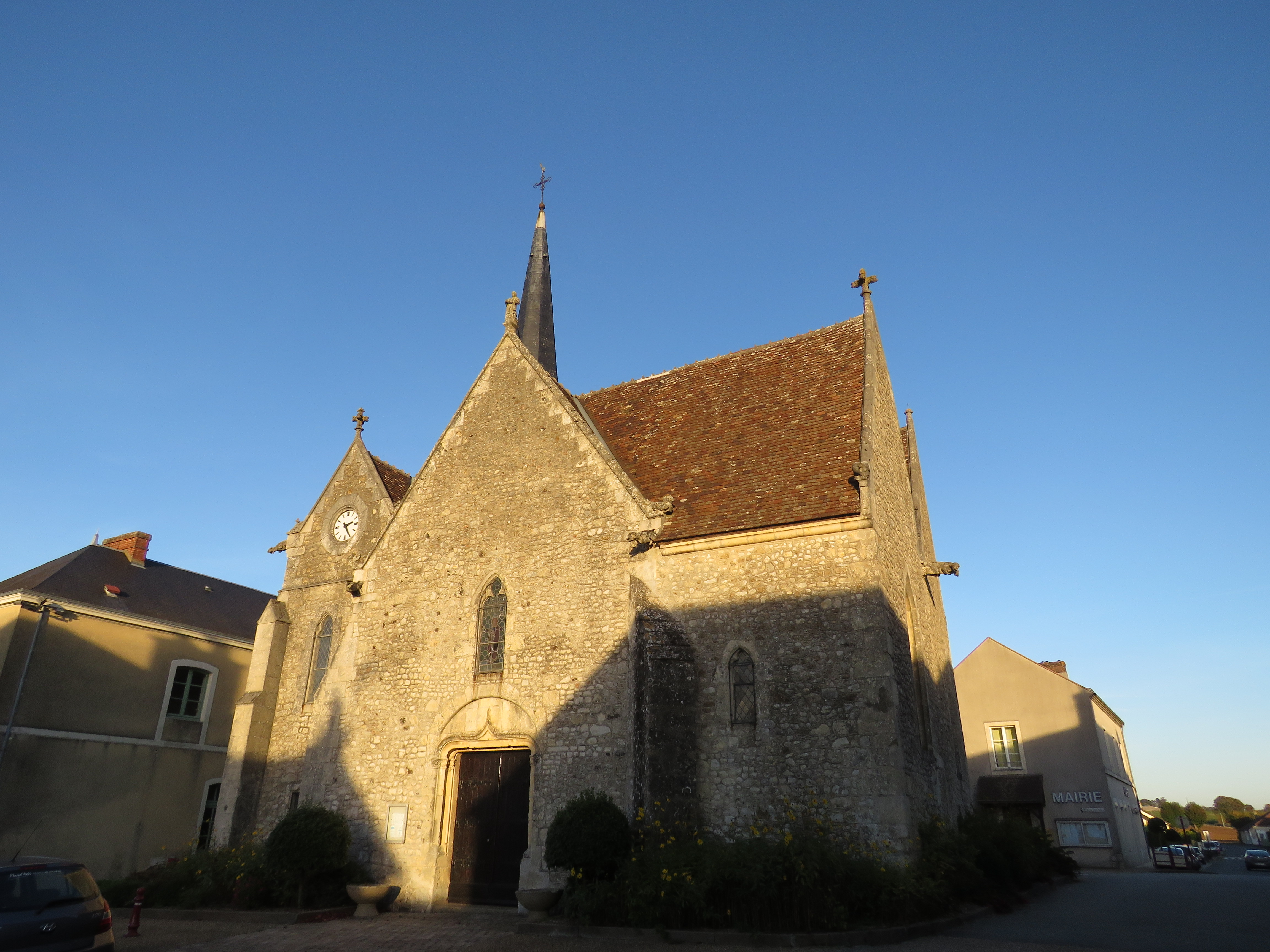 Église